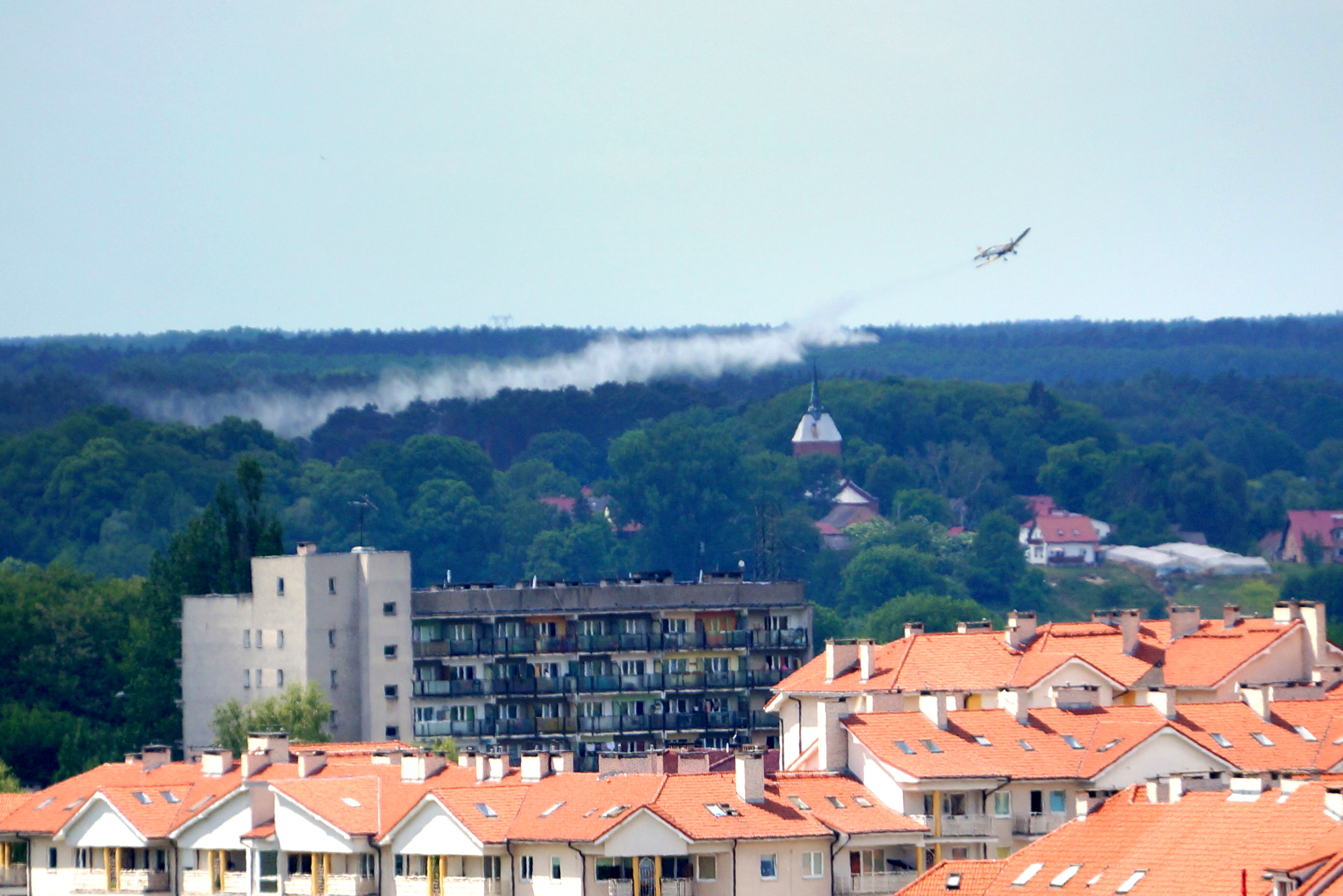 Zrzut wody z samolotu ( PZL M18 Dromader ), podczas gaszenia pożaru na przedmieściach Gorzowa Wlkp.